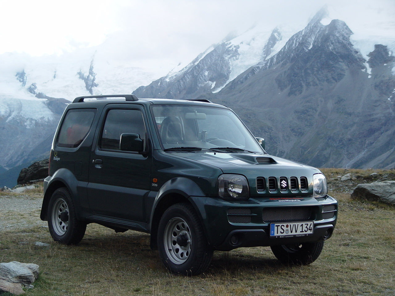 Suzuki Jimny 1.5 DDiS Ranger